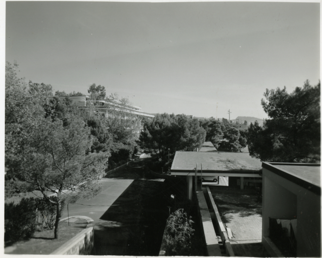 Servizio fotografico : Pozzuoli, 1965 / Paolo Monti. - Fototipi: 7 : Positivo b/n, gelatina bromuro d'argento/ carta, provino a contatto da pellicola 10x12. - ((Al verso dei provini a contatto manoscritti i numeri dei negativi corrispondenti identificati con i nn.: 11943, 11944, 11945, 11946, 11947, 11948, 11949; timbro a inchiostro con copyright (Via Tasso - Milano). - La suddetta serie è contenuta nella scatola dei provini identificata con il n. 177; sul coperchio iscrizione didascalica manoscritta a pennarello nero: "Provini". - Confronta scheda G11932-11956. - Sull'agenda citata nel campo Fonti in corrispondenza del giorno 1965/11/10 iscrizione inventariale manoscritta "11932-11956"; ma nelle immagini sono riprodotti i lavori di costruzione di parte dello stabilimento? inaugurato nell'aprile del 1955. - Fonte: Agenda di Paolo Monti: Monti/ 2/ 6 giugno 1964 - 31 marzo 1966/ 8194-12420 (1964-1966), presso Archivio Paolo Monti